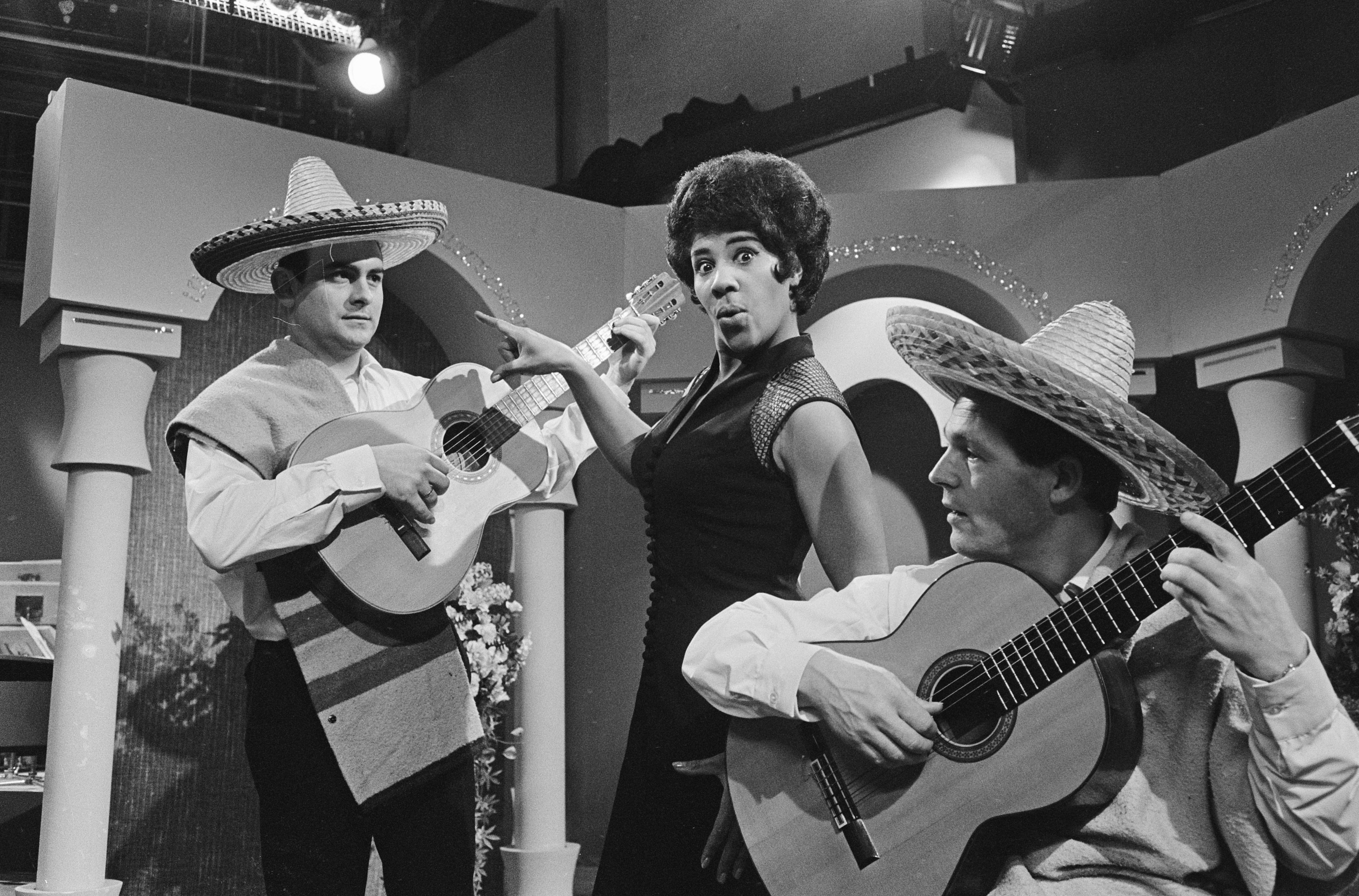 Collectie / Archief : Fotocollectie Anefo Reportage / Serie : [ onbekend ] Beschrijving : Nationaal Songfestival 1966. Milly Scott met haar "Fernando en Filippo" Datum : 5 februari 1966 Trefwoorden : artiesten, muziek, songfestivals, zangeressen Persoonsnaam : Scott, Milly Instellingsnaam : Nationaal Songfestival Fotograaf : Koch, Eric / Anefo Auteursrechthebbende : Nationaal Archief Materiaalsoort : Negatief (zwart/wit) Nummer archiefinventaris : bekijk toegang 2.24.01.05 Bestanddeelnummer : 918-7514